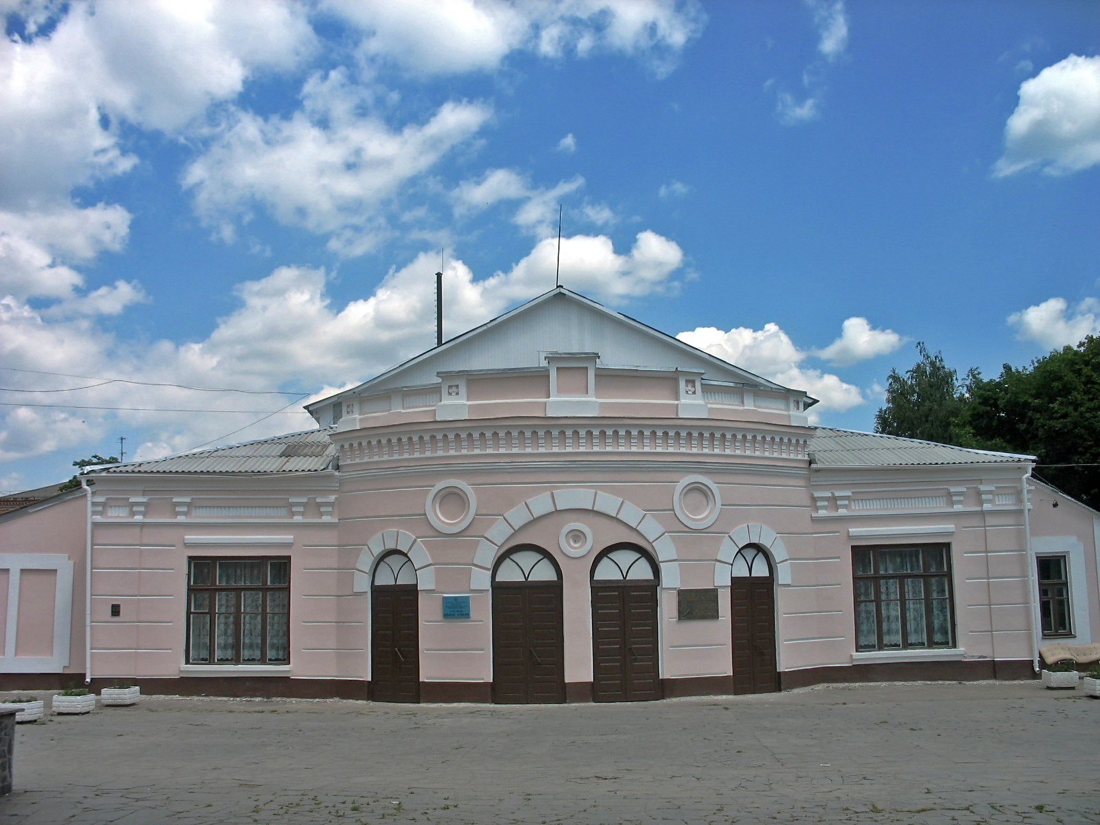 Будинок, в якому в 1917 р. відбувався з'їзд революційних представників південно-західного фронту., Бердичів, Вул. К. Лібкнехта, 21 (Районний БК)